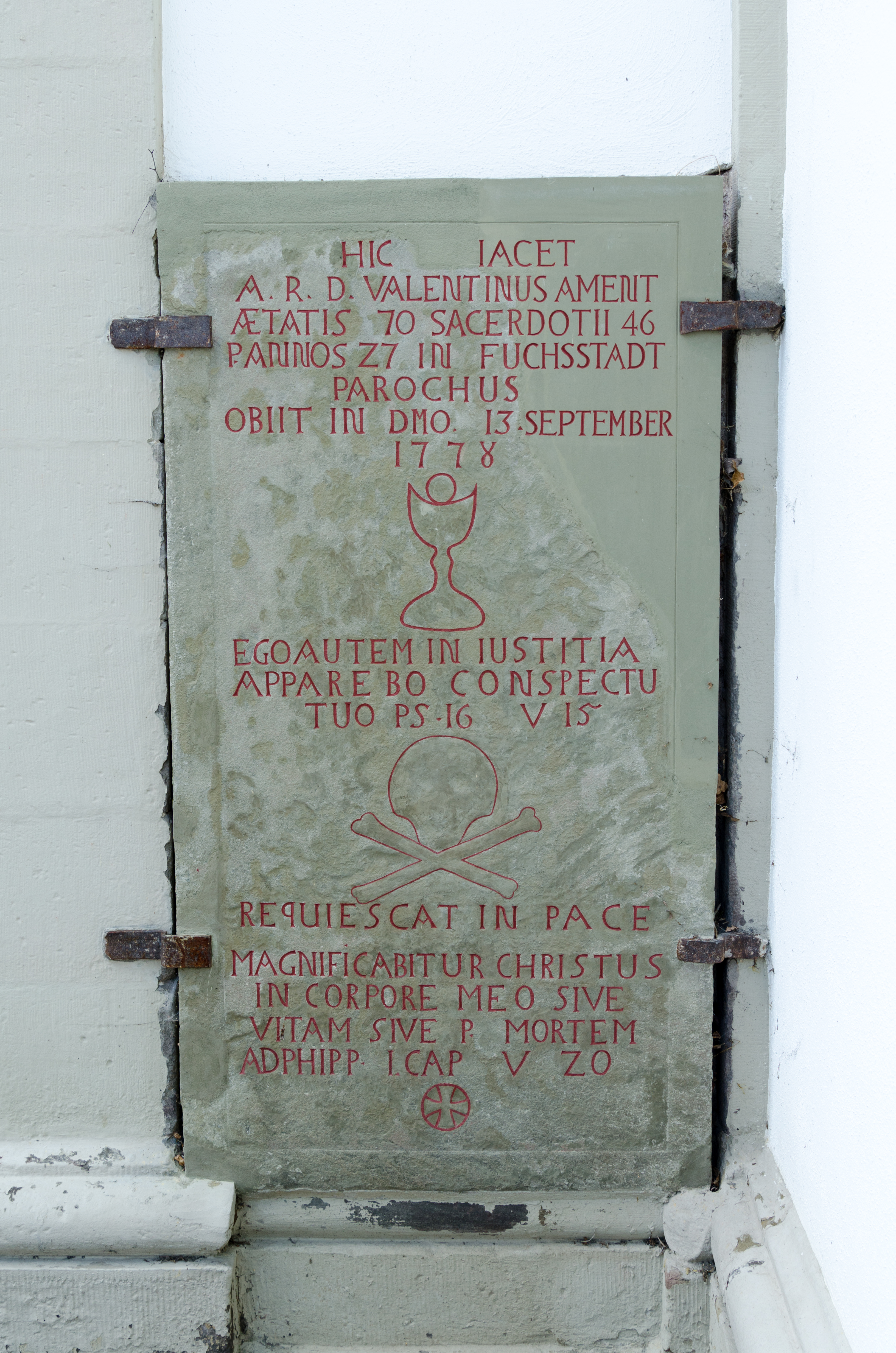 Fuchsstadt, Katholische Kirche